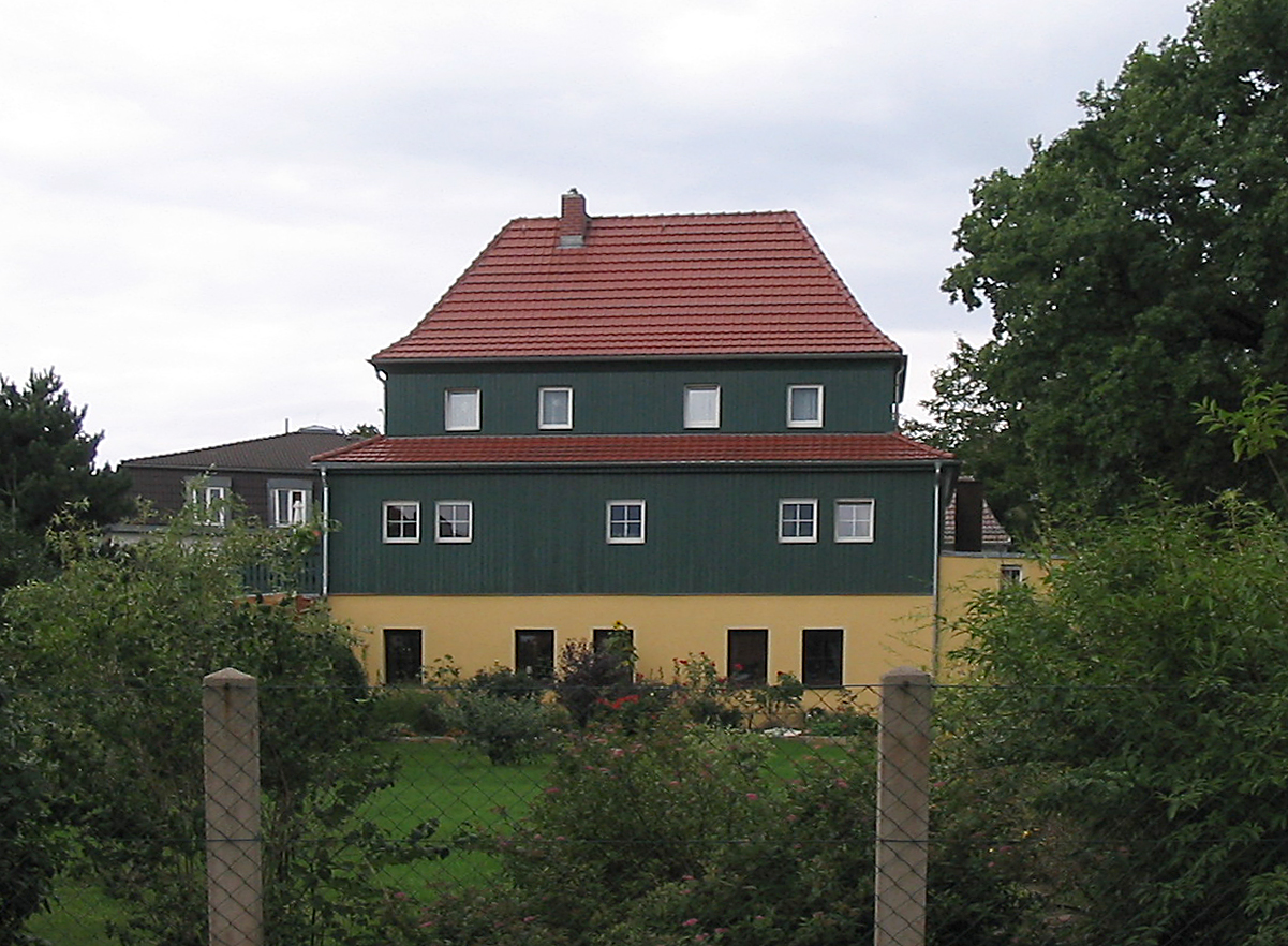 Haus Thieme, Oberlößnitz, 2008